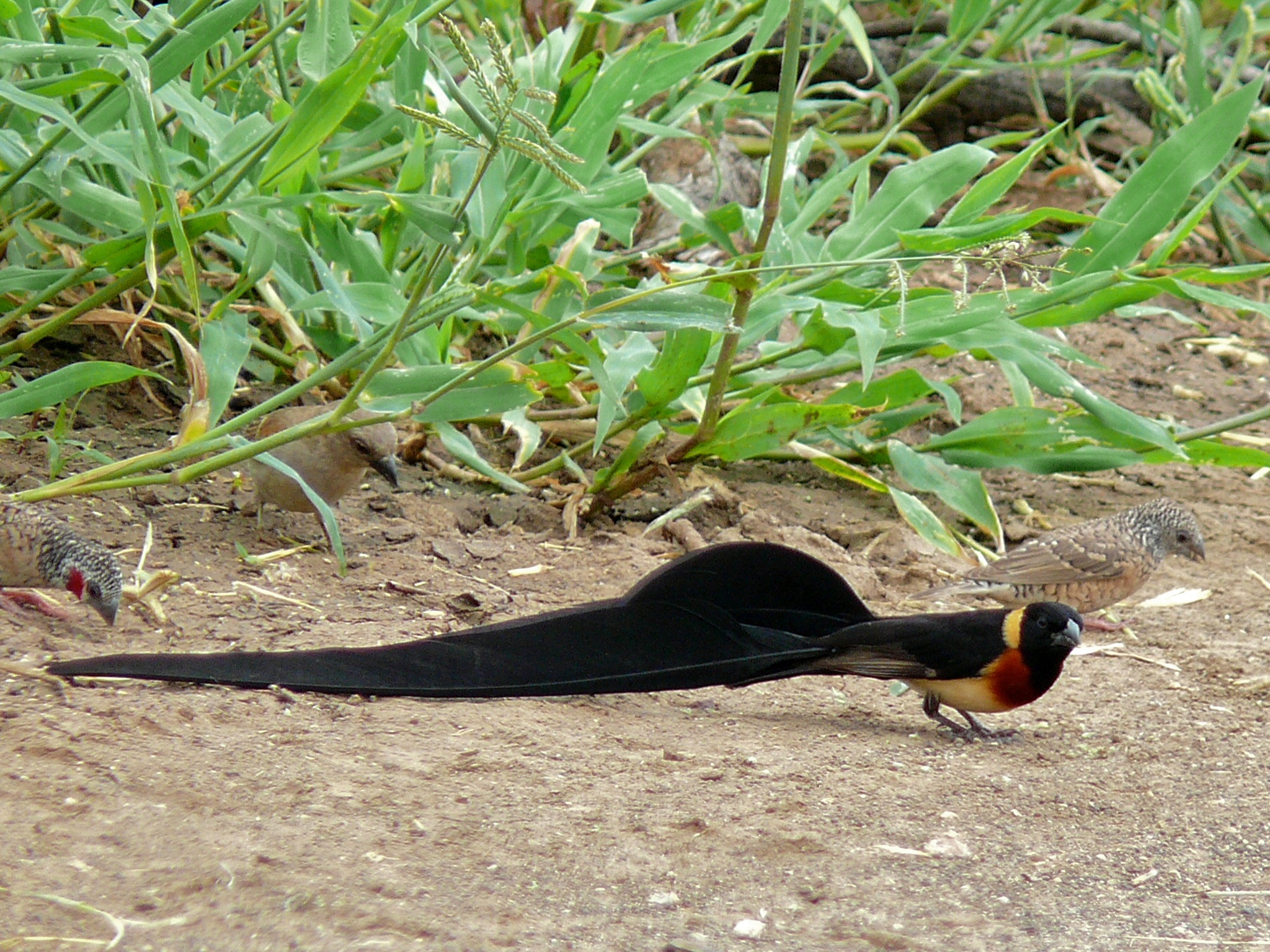 S63 near Pafuri, Kruger NP, SOUTH AFRICA